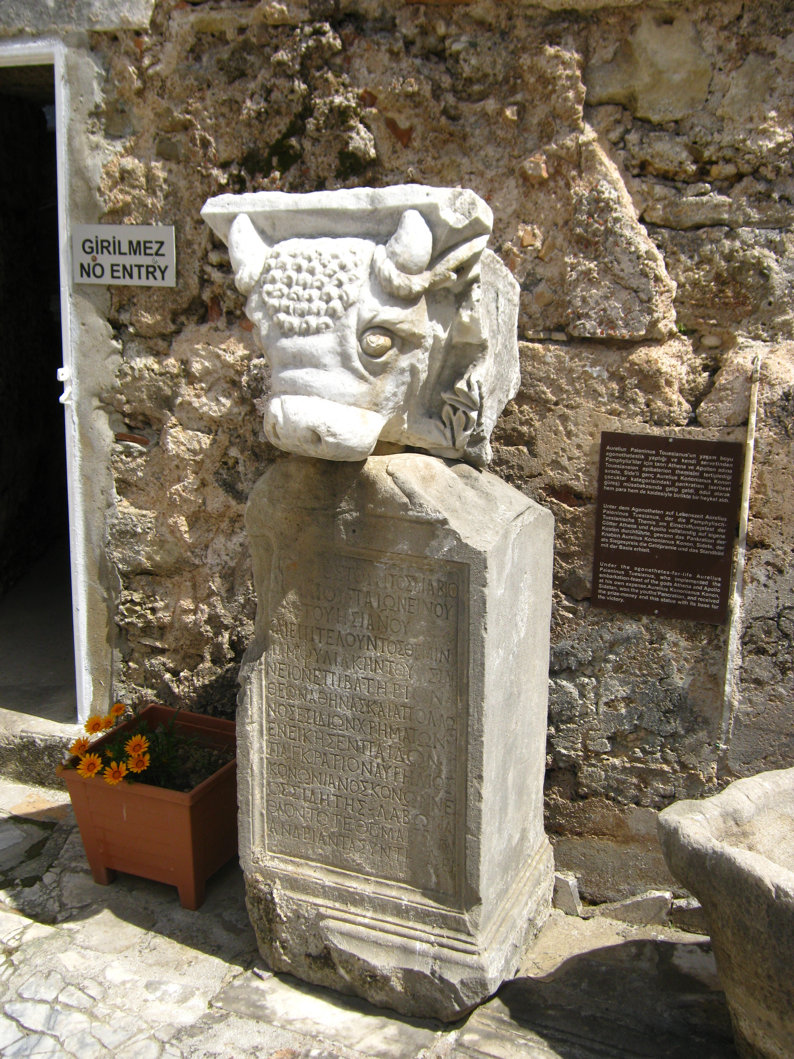 Мармуровий постамент з посвятним написом